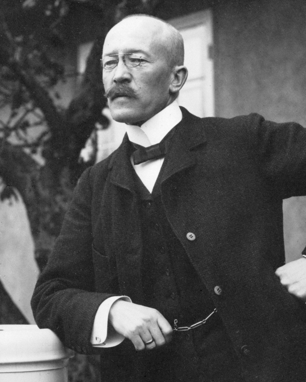 Arkitekt Ferdinand Boberg 1903